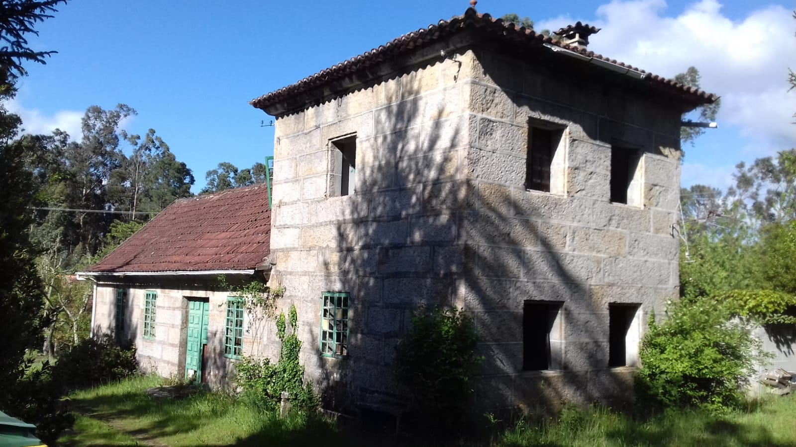 Casa do Viveiro, antiga residencia dos gardamontes da Serra do Galleiro.